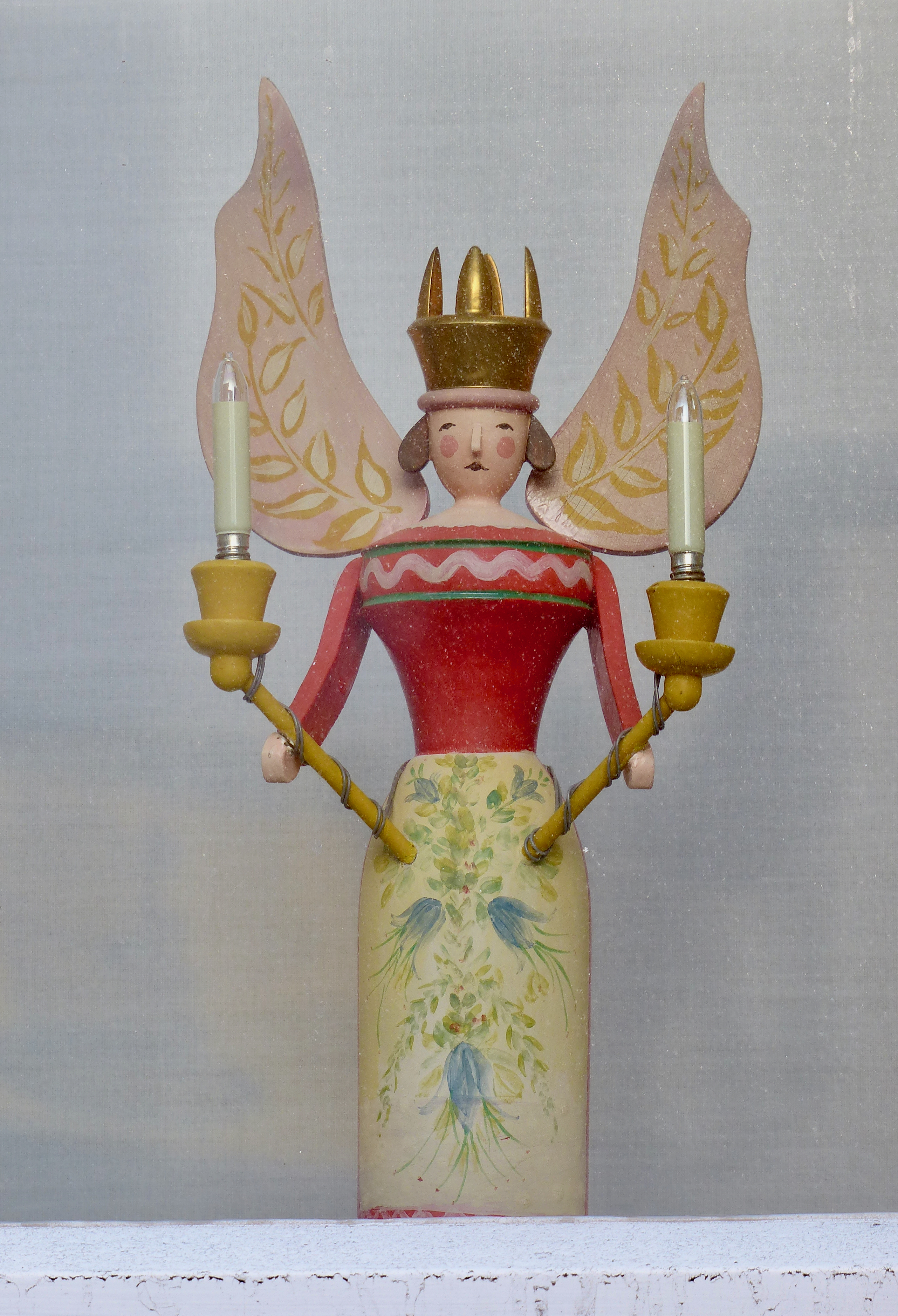 Wendt u Kühn Aussendekoration in Grünhainichen: Lippersdorfer Engel